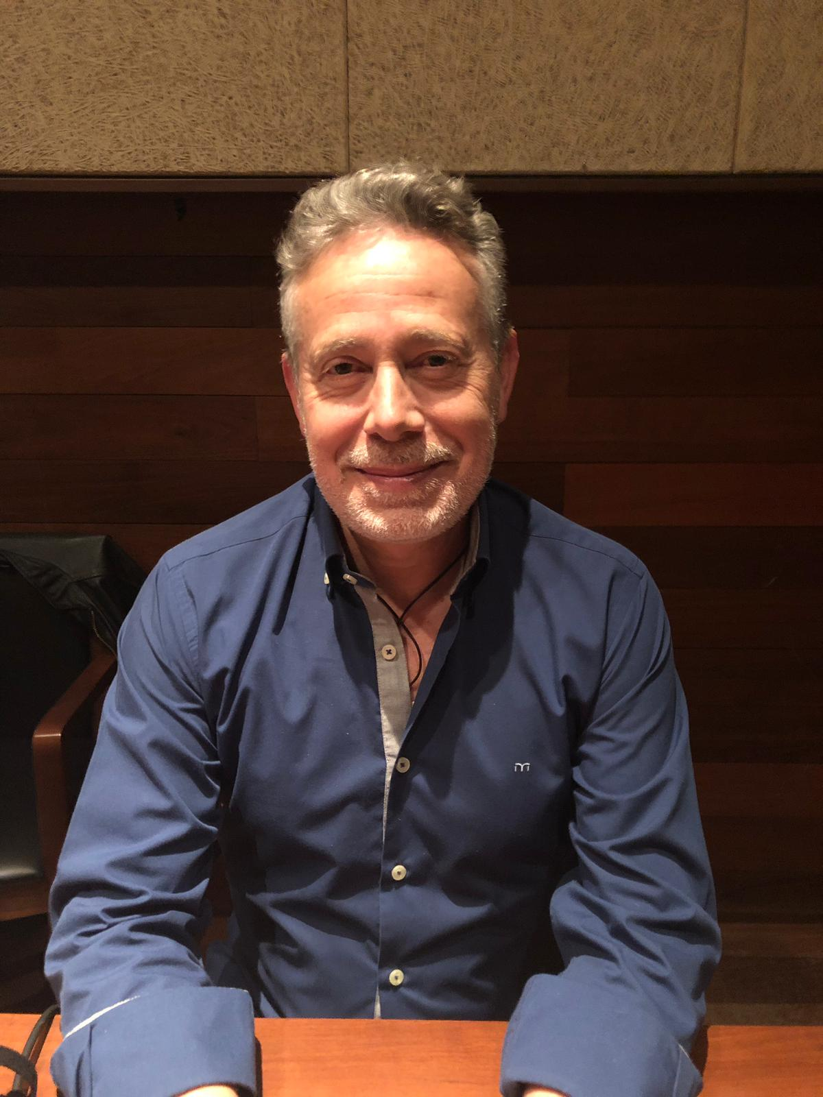 N el Museo Etnográfico de Castilla y León